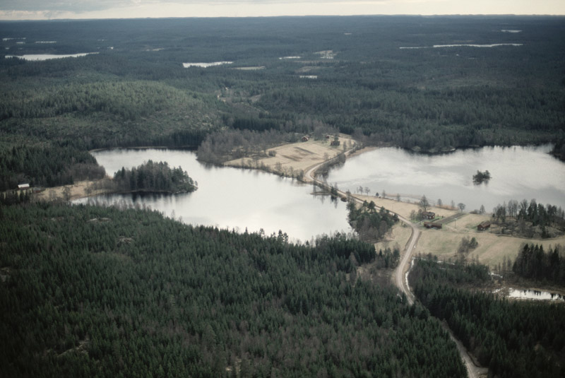 Torpmiljö vid Kornsjön Motiv: Flötemarksön Nyckelord: Flygbilder, Riksintressen Kategori: Insjömiljöer, Skogsbygd Torpmiljö vid Kornsjön.